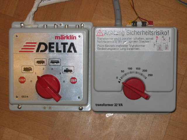 Märklin Delta Control mit Trafo